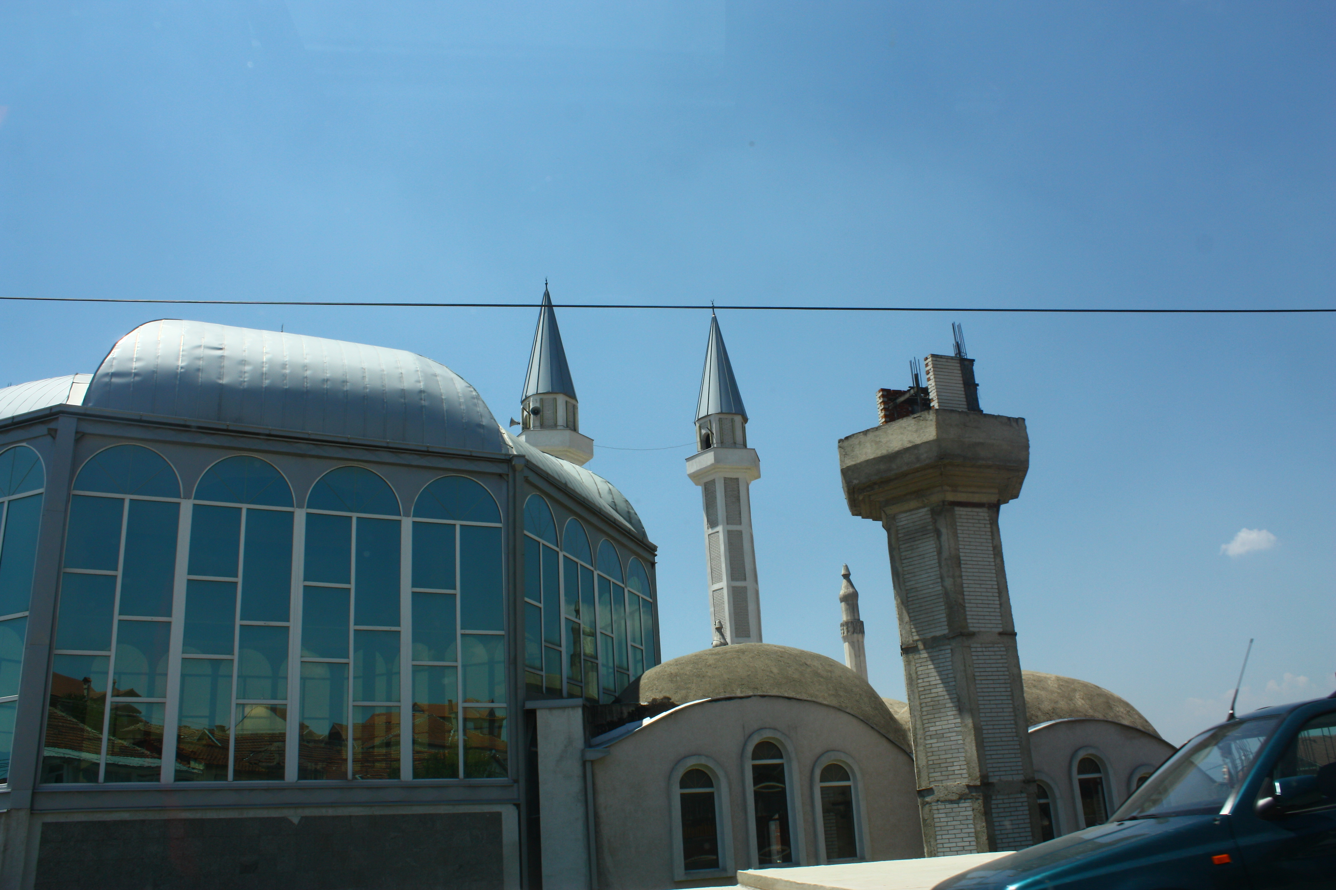 Џамија Амди паша во Шутка, Скопје